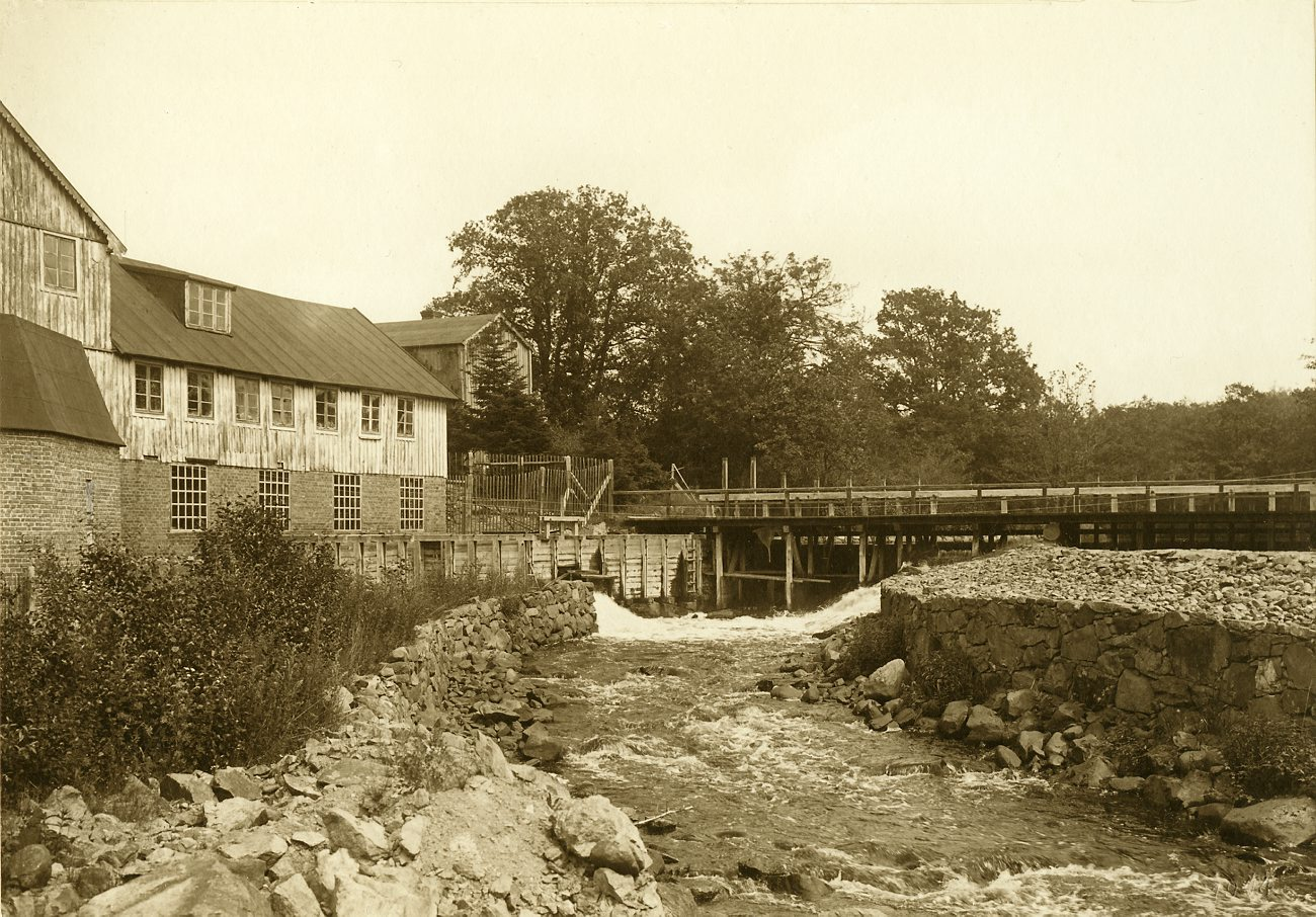 DIG91690. Bro- och dammbyggnas över Lyckebyån vid Mariefors nu nedlagda fabriker i Augersrum socken, Blekinge län. För fotografiet erhöll fotografen S.T.F:s Foto Stipendium 1904. Fotografiet är skänkt till Tekniska museet från Svenska Turistföreningen.